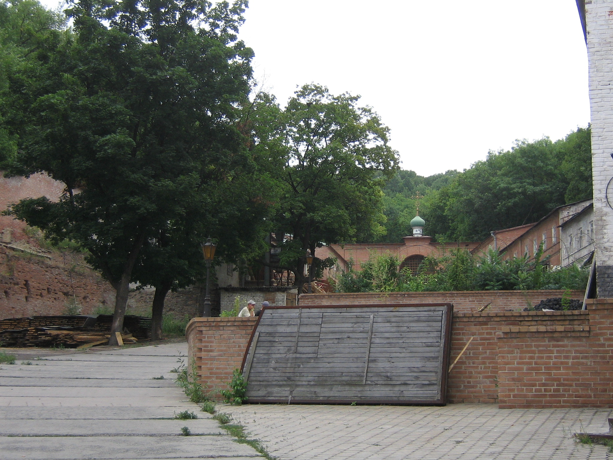 Svyatogirs'kaya Lavra 50.JPG